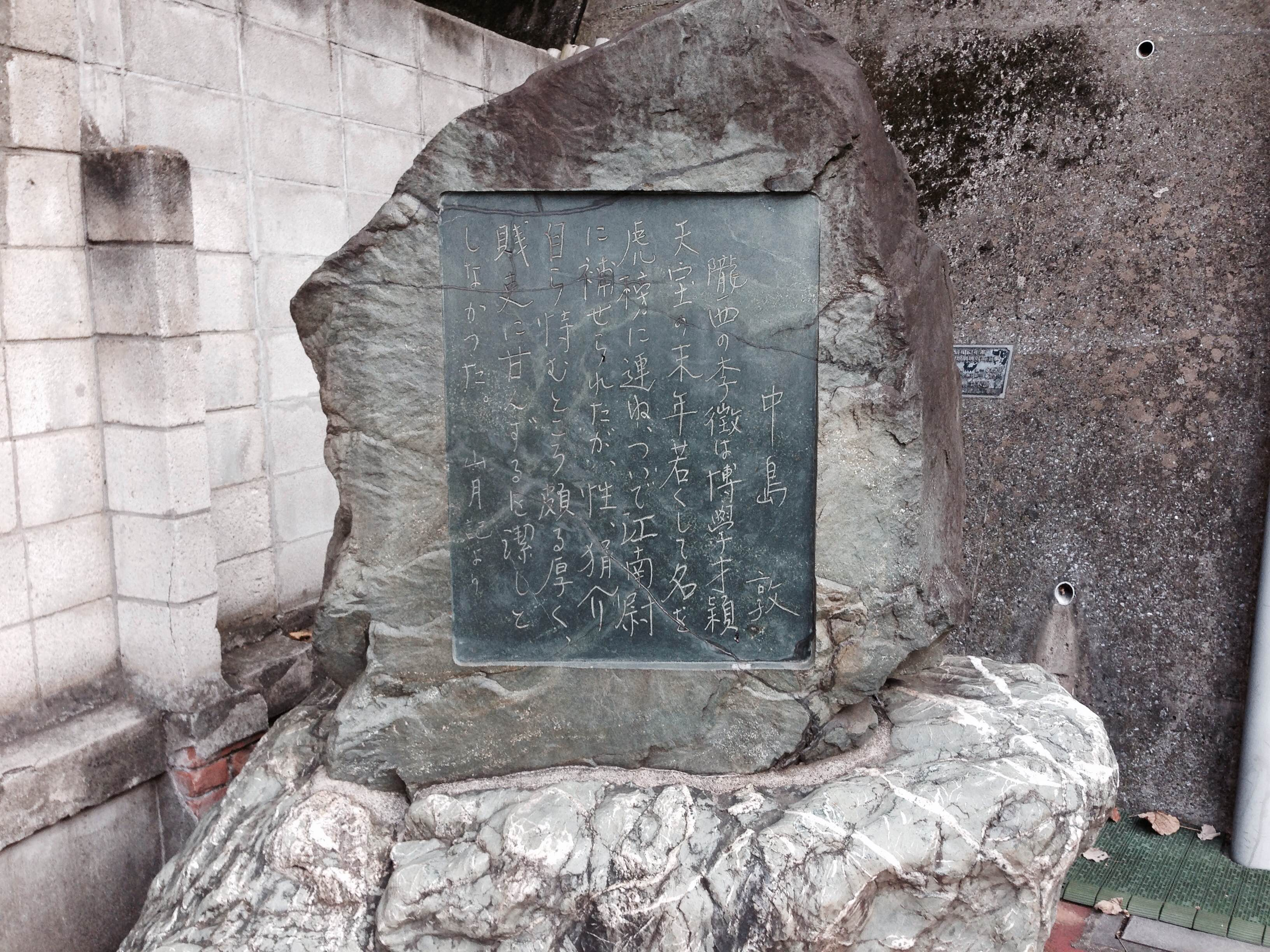 横浜市の元町幼稚園敷地内に所在